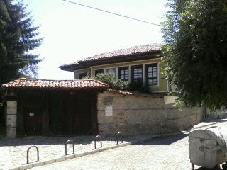 Panaguirischte (Bulgaria)_Tutev's House